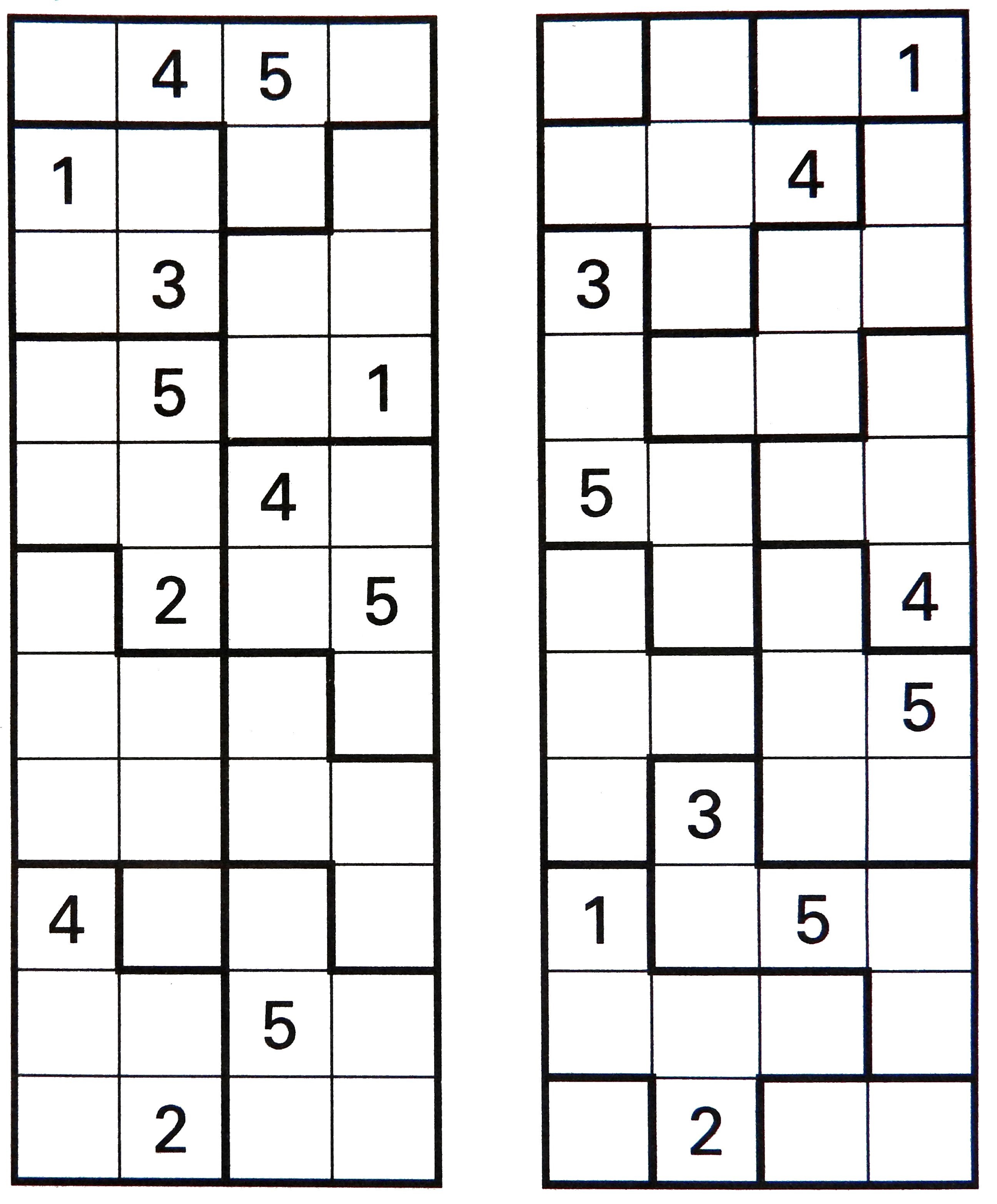 Begindiagrammen tectonic puzzels